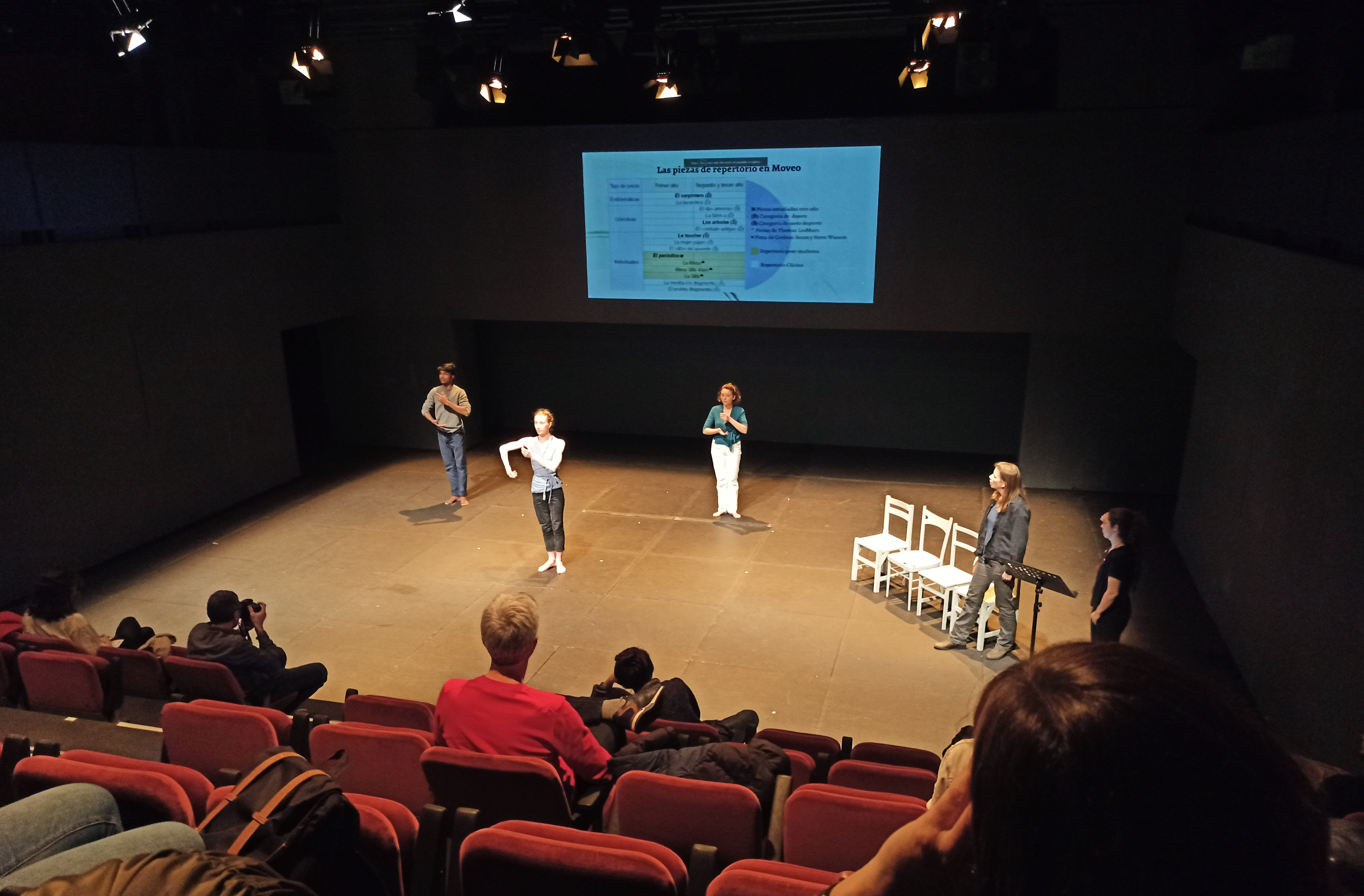 En el marco de las medidas anti contagio y antes del cierre total por estado de emergecia, en España fue obligatorio reducir el aforo al 30% de los espacios de exhibición y formativos. Aquí un ejemplo de un auditorio lleno, con personas cada dos filas y tres espacios de separación.